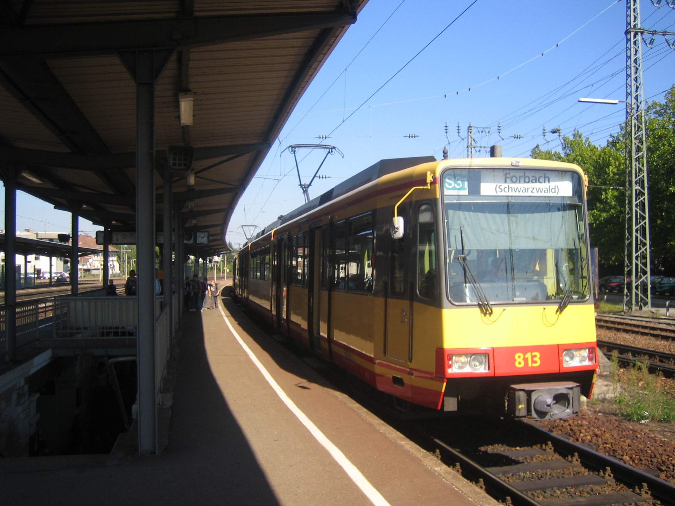 Stadtbahn im Bahnhof Rastatt, selbst fotografiert